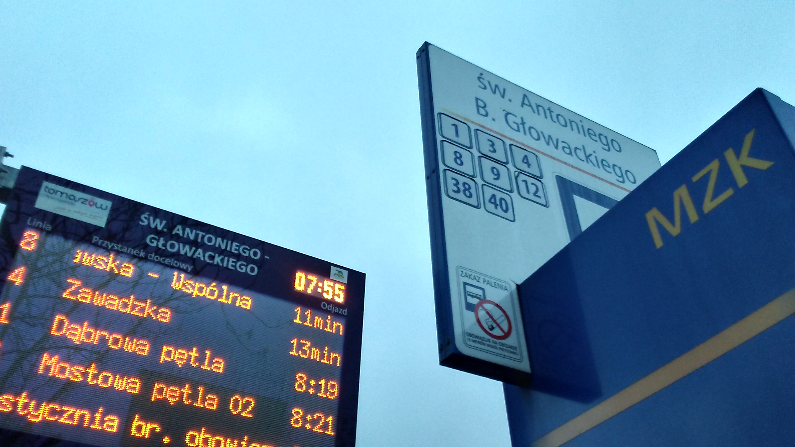 Jeden z wyświetlaczy Systemu Informacji Pasażerskiej w Tomaszowie Mazowieckim z 2017 roku. Element modernizacji komunikacji publicznej w Tomaszowie z czasów kadencji prezydenta z Prawa i Sprawiedliwości - Marcina Witko. W tym czasie wprowadzono również bezpłątną komunikacje miejską, zakupiono nowe hybrydowe autobusy, oraz pobudowano nową bazę MZK.